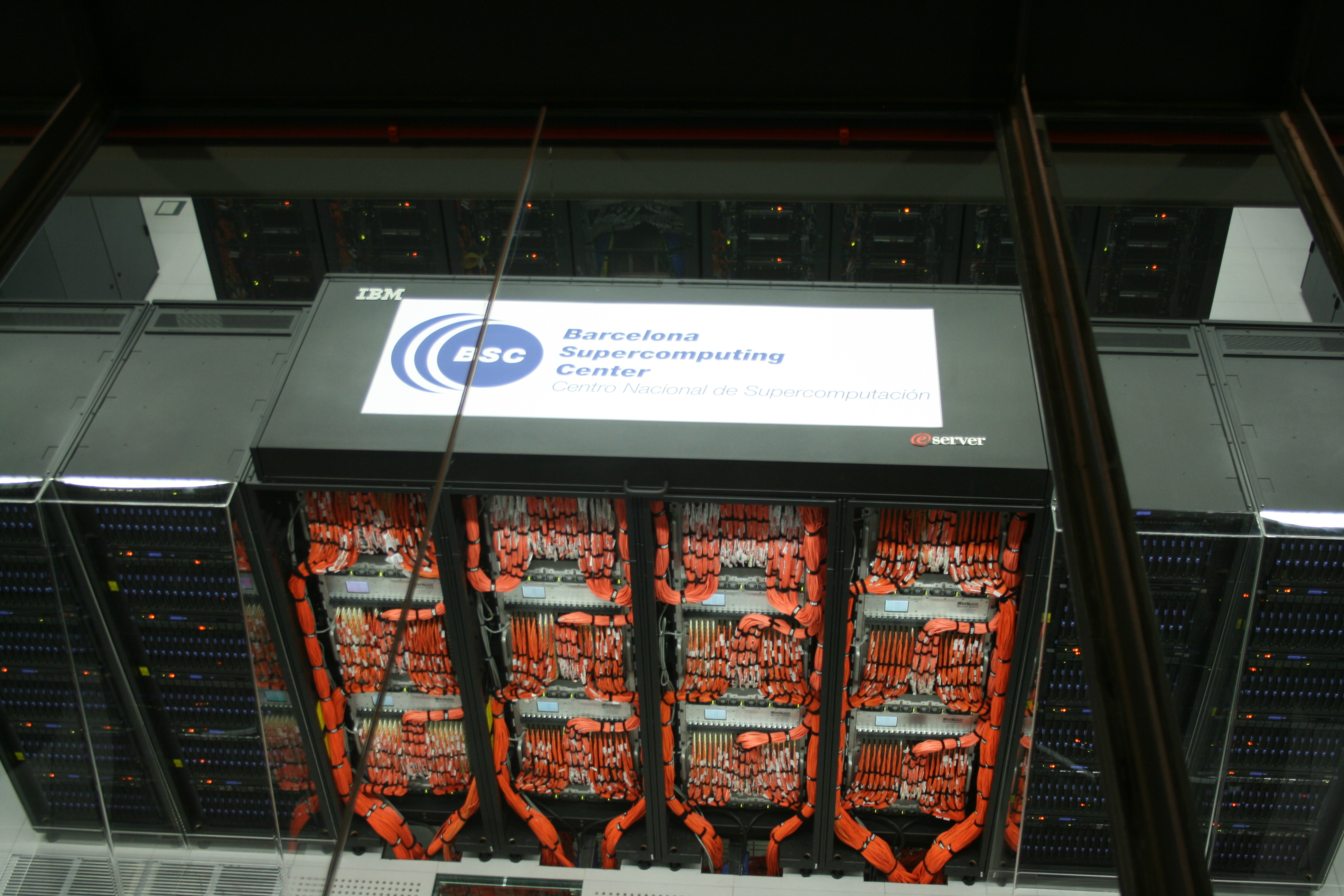 El interior del Barcelona Supercomputing Center, Universitat Politècnica de Catalunya